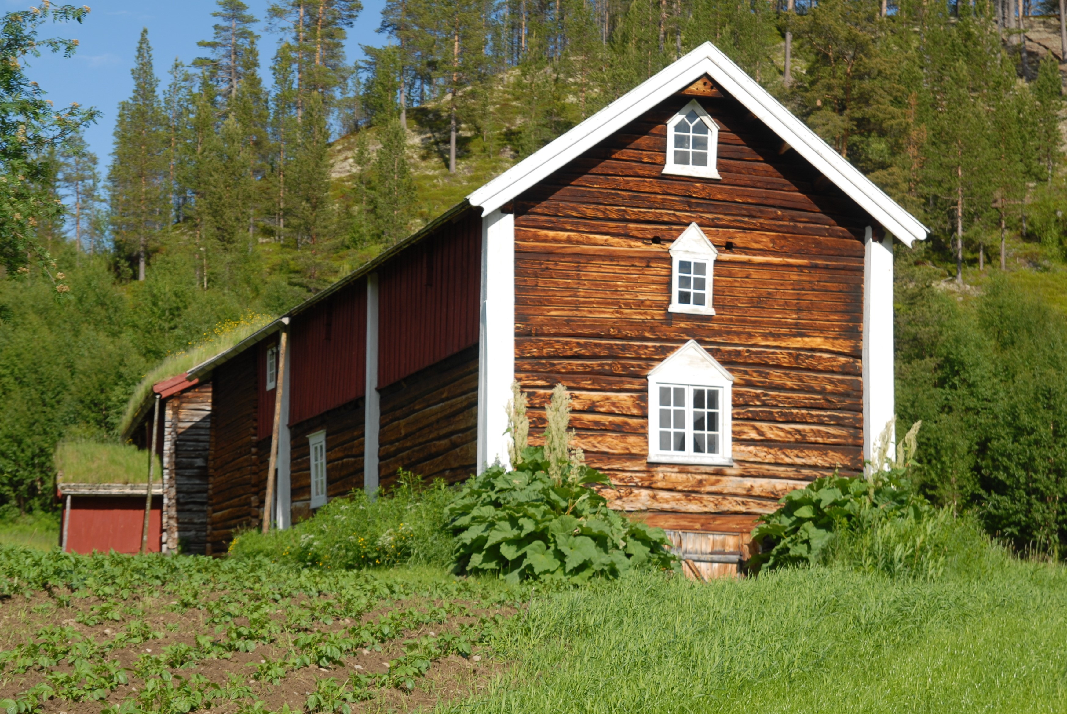 Volden gård, Os, Hedmark